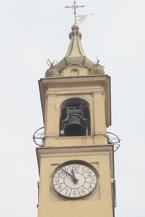 Il campanile di Malvaglio, frazione di Robecchetto con Induno (MI)